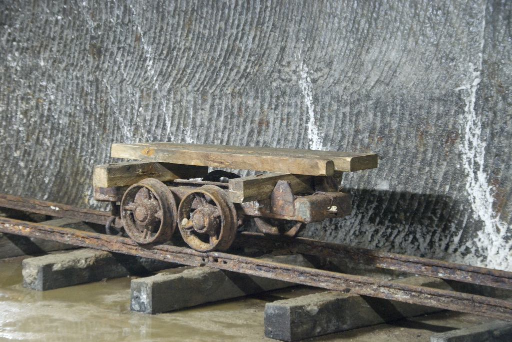 Salina Turda, vagonet vechi de transport al sării geme din sala puţului de extracţie al minei Rudolf.